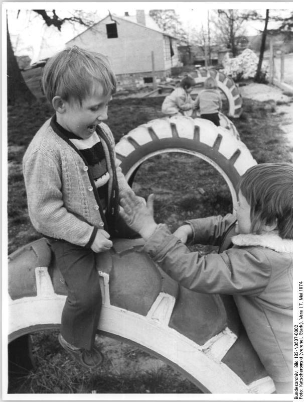 Dodow, Spielplatz des Kindergartens ADN-ZB Katscherowski 7.5.74-Gü Bezirk Schwerin: Neuer Kindergarten für Dodow- Vergnügt spielen Matthias (l.) und Jörn auf dem Spielplatz des neuentstandenen Kindergartens in Dodow, Kreis Hagenow. In gemeinsamer Arbeit mit der LPG "Apfelblüte" errichteten die Bürger der Gemeinde außer dem Kindergarten mit einer Kapazität von 20 Plätze ein Arztzimmer und einen neuen Dorfkonsum. Siehe dazu auch die Motive N0507-1, 3 N!